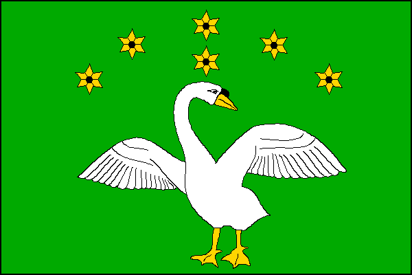 vlajka, Křídla, okres Žďár nad Sázavou